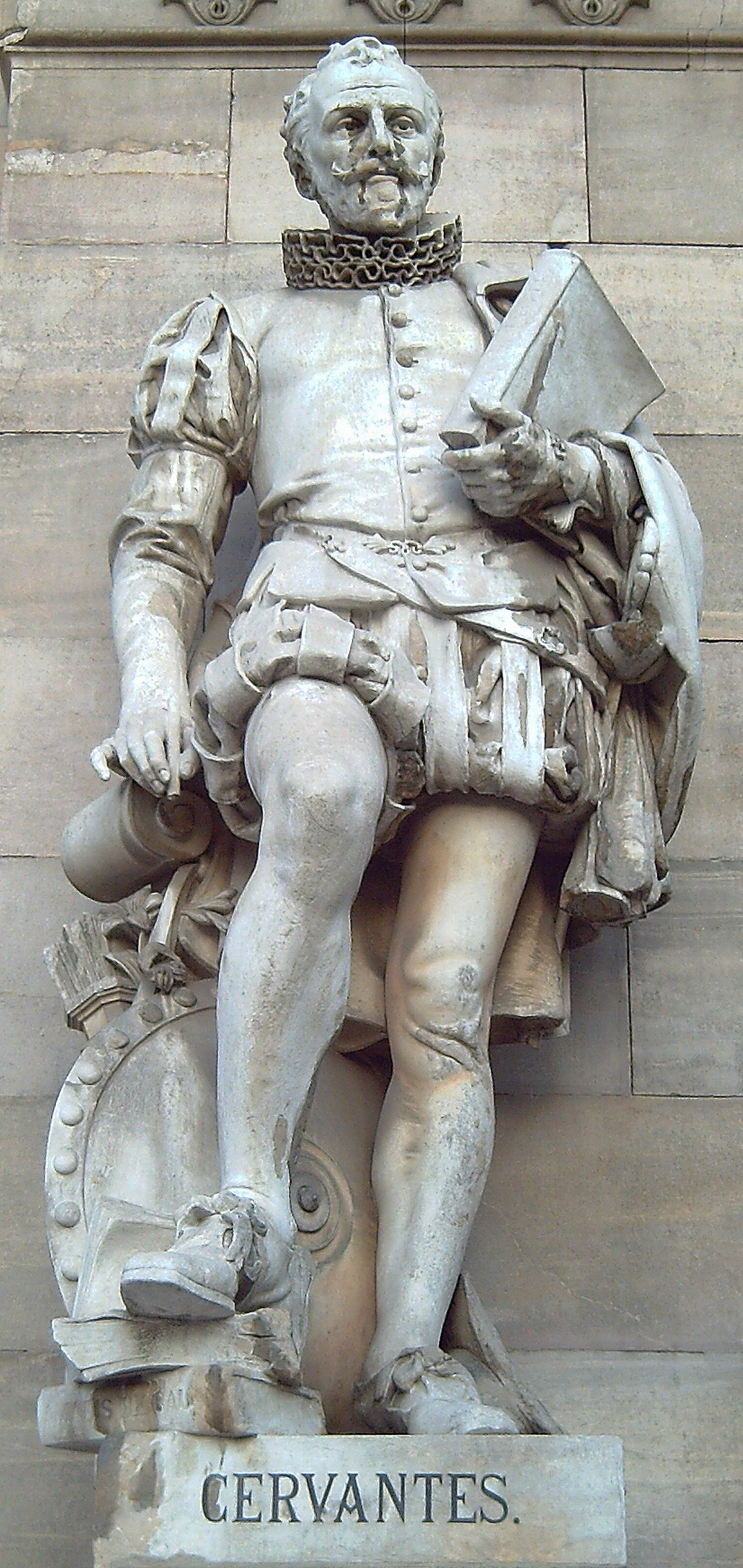 Depicted person: Miguel de Cervantes.